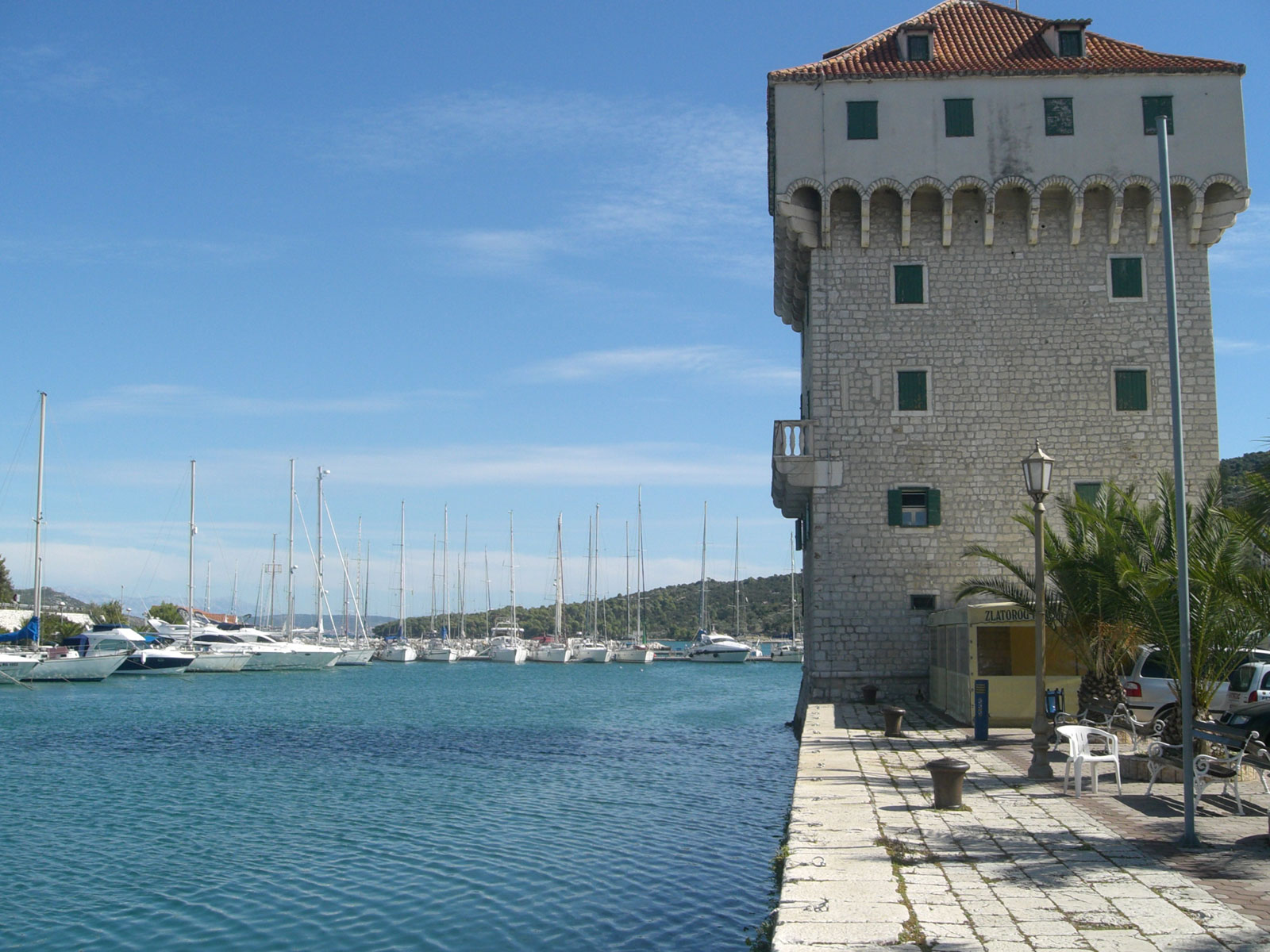 Marina, Hrvatska